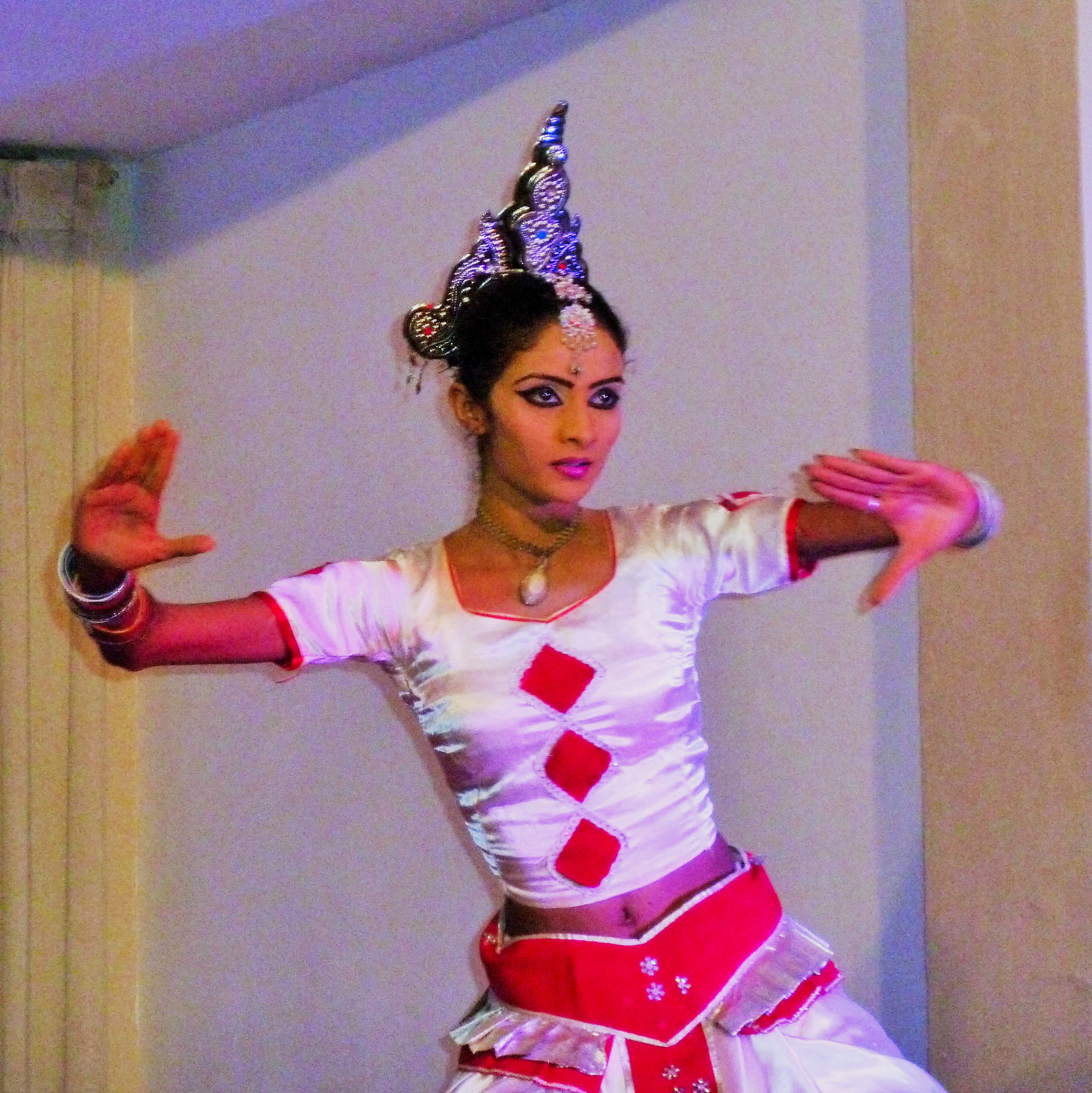 Oak- Ray Kadyan Dance à Kandy Sri Lanka.- Asie du SudLes danseuses dans Puja Natuma miment les gestes gracieux du paon, l'oiseau qui transportait Skanda, le dieu de la guerre à Ceylan adoré tant par les hindous que par les bouddhistes.